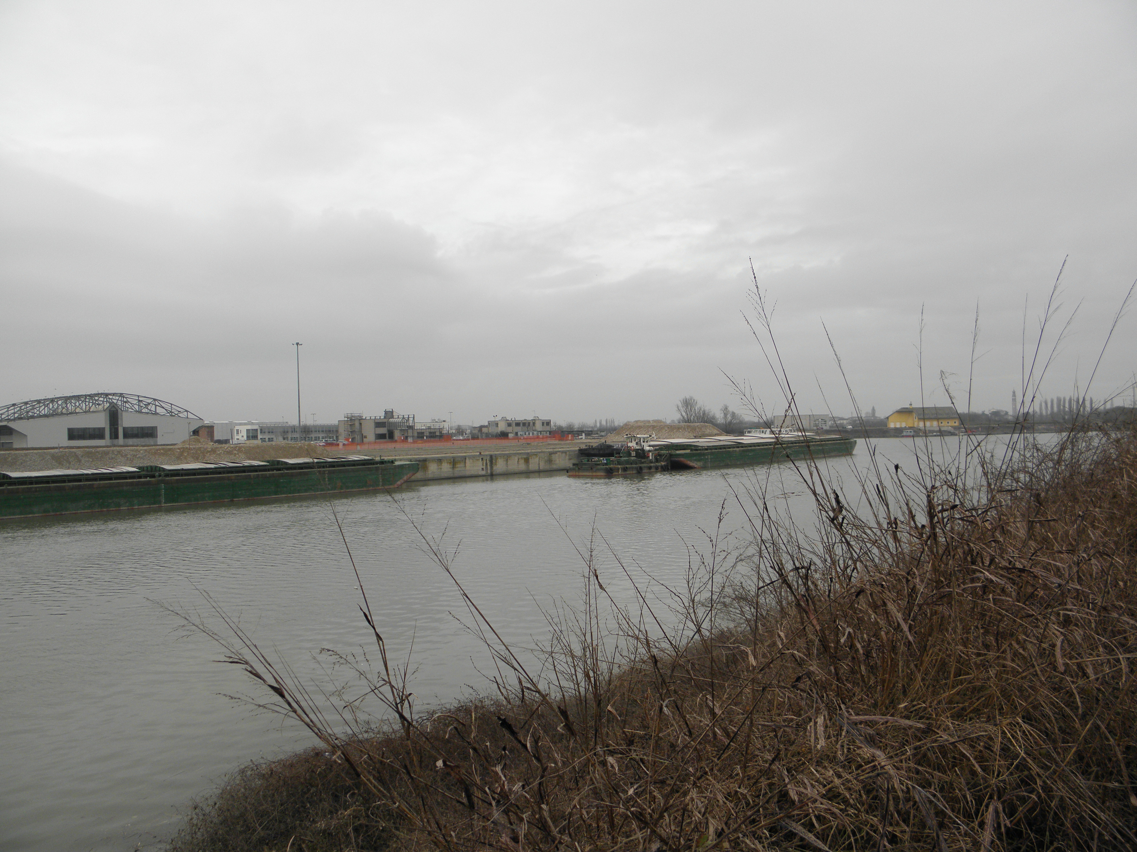 Rovigo, il porto: vista dalla sponda destra del Canalbianco.